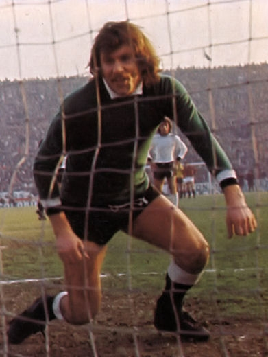 Lamberto Boranga trafitto da un rigore di Egidio Calloni in Cesena-Milan (2-1) del 18 gennaio 1976.